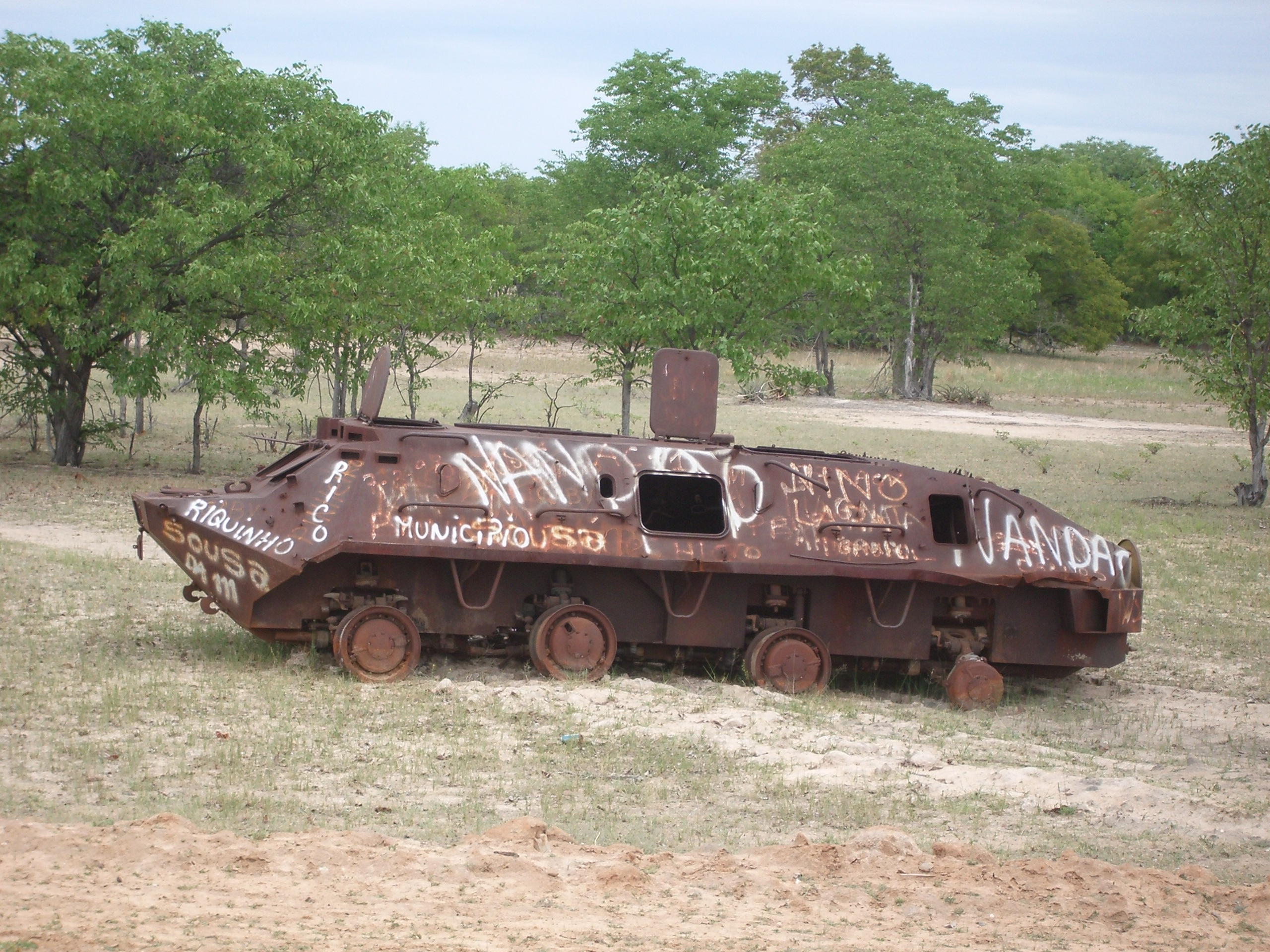 Zerstörter Panzer bei Xangango (Angola)